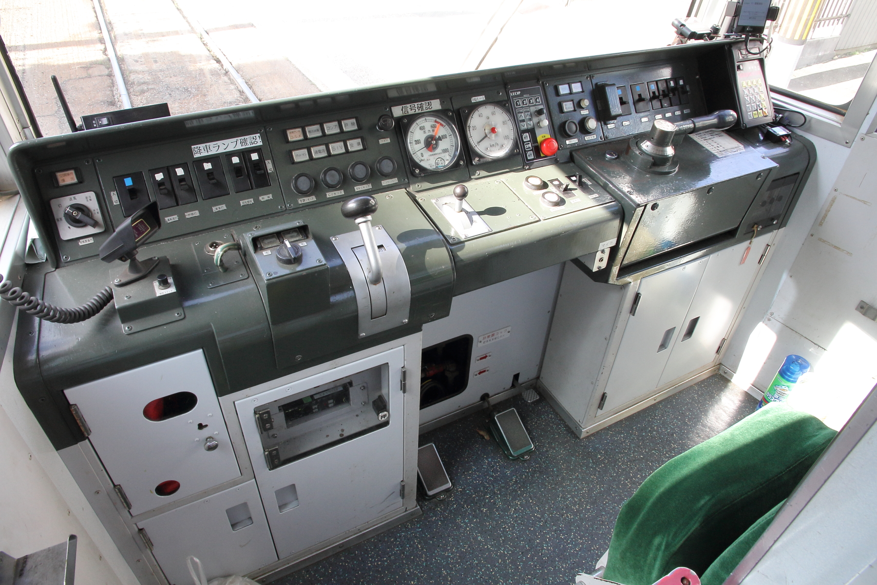 豊橋鉄道モ800形801の運転台